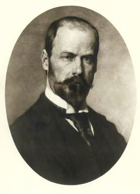 Porträt Philipp Wilhelm von Schoeller, der Jüngere (1845-1916)